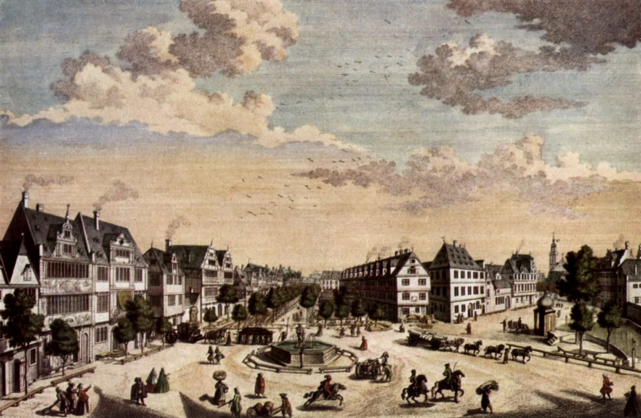 kolorierter Kupferstich 21 x 32 cm; Ansicht des Roßmarktes von Süden 1738